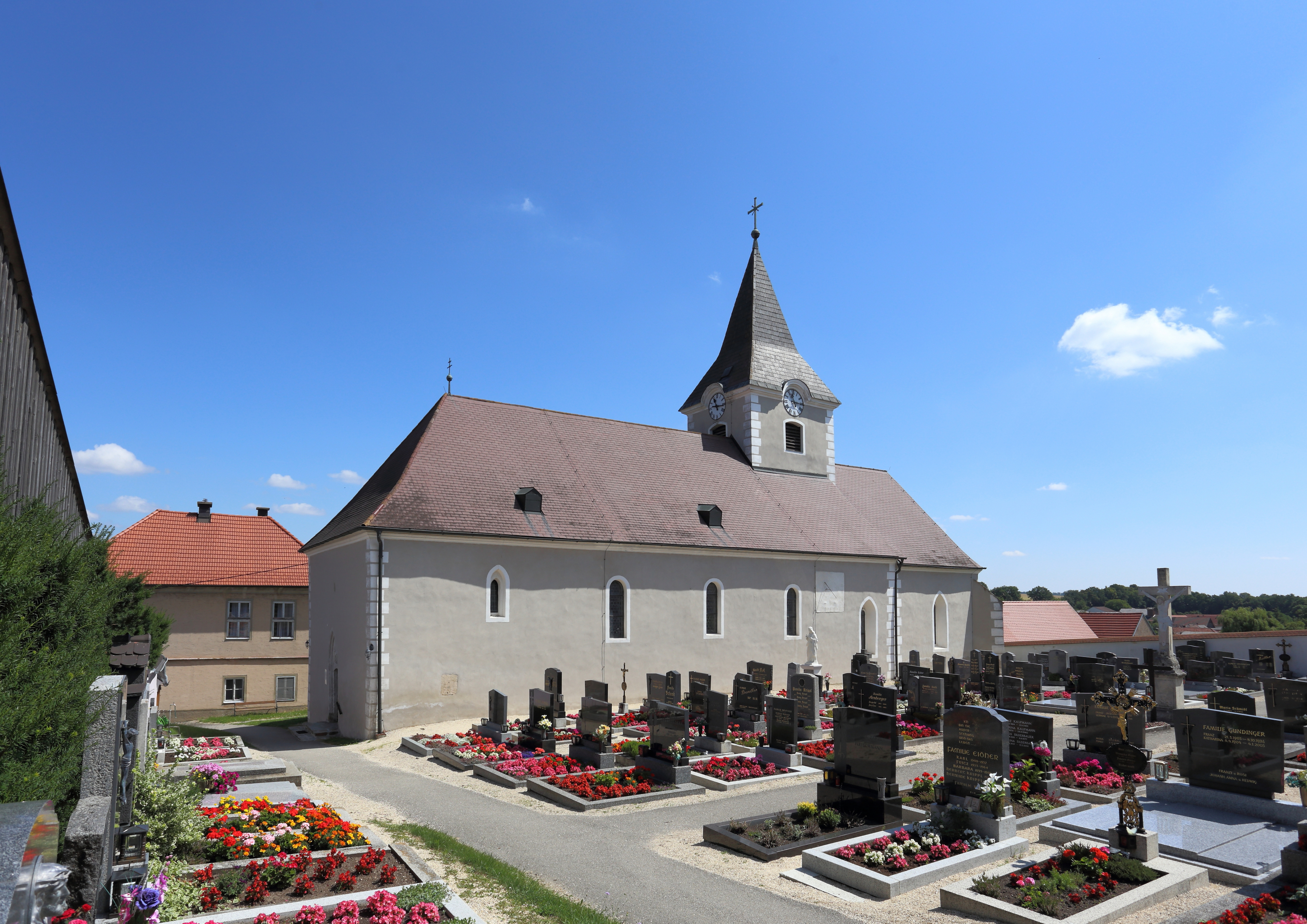 Katholische Pfarrkirche Kreuzerhöhung in Theras, ein Ortsteil der niederösterreichischen Marktgemeinde Sigmundsherberg. Eine Kirche mit einem frühgotischen/gotischen Langhaus und einem Ende des 14. Jahrhunderts angebauten Chor. In der 2. Hälfte des 17. Jahrhunderts erfolgten Umbauten wie beispielsweise die barocken Rundbogenfenster beim Langhaus. Ein weiterer Umbau erfolgte 1832. Der ehemalige freistehende romanische Turm ist durch den Chor sowie den südlichen und nördlichen Anbau unter einem einheitlichen Dach im unteren Teil ummantelt und wirkt daher wie ein Dachreiter. Der Pyramidenhelm des Turmes wurde 1833 aufgesetzt.